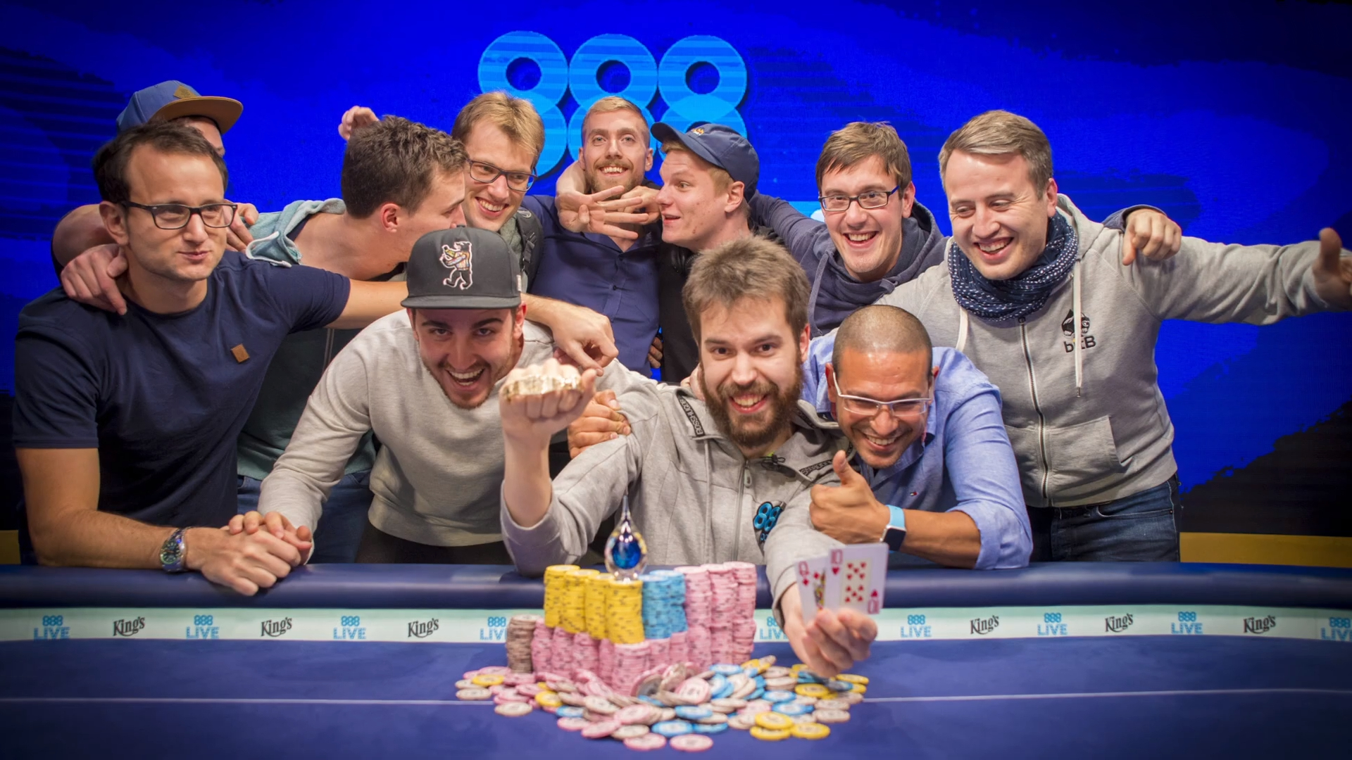 Dominik Nitsche (vorne, Mitte) nach dem Gewinn des High Roller for One Drop der World Series of Poker Europe 2017 in Rozvadov. Außerdem auf dem Bild v. l. n. r. Rainer Kempe, Stefan Schillhabel, Steffen Sontheimer, Koray Aldemir, Christoph Vogelsang, Manig Löser, Marius Gierse, Christian Christner, (?) und Dietrich Fast.